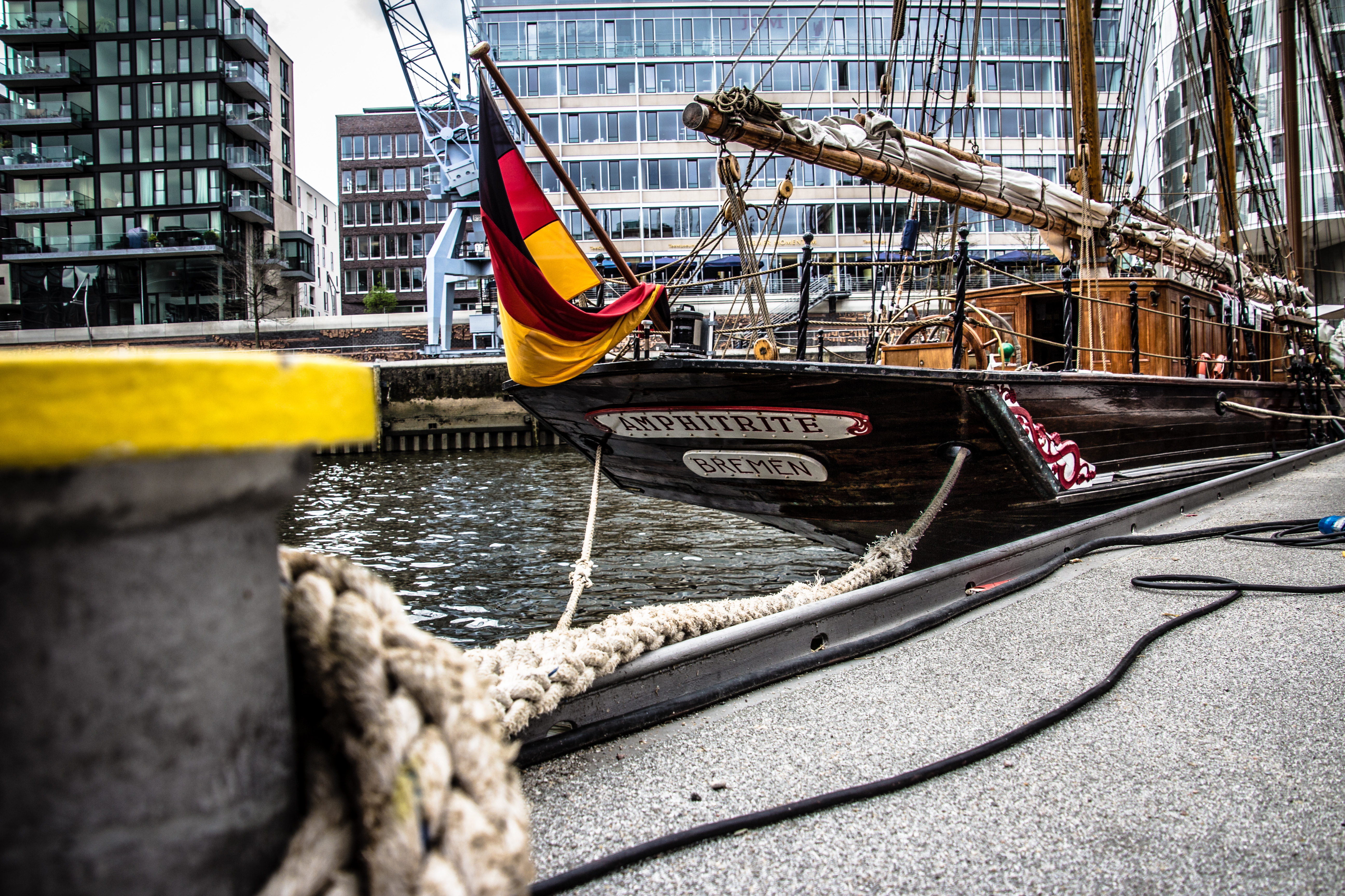 L'Amphitrite.